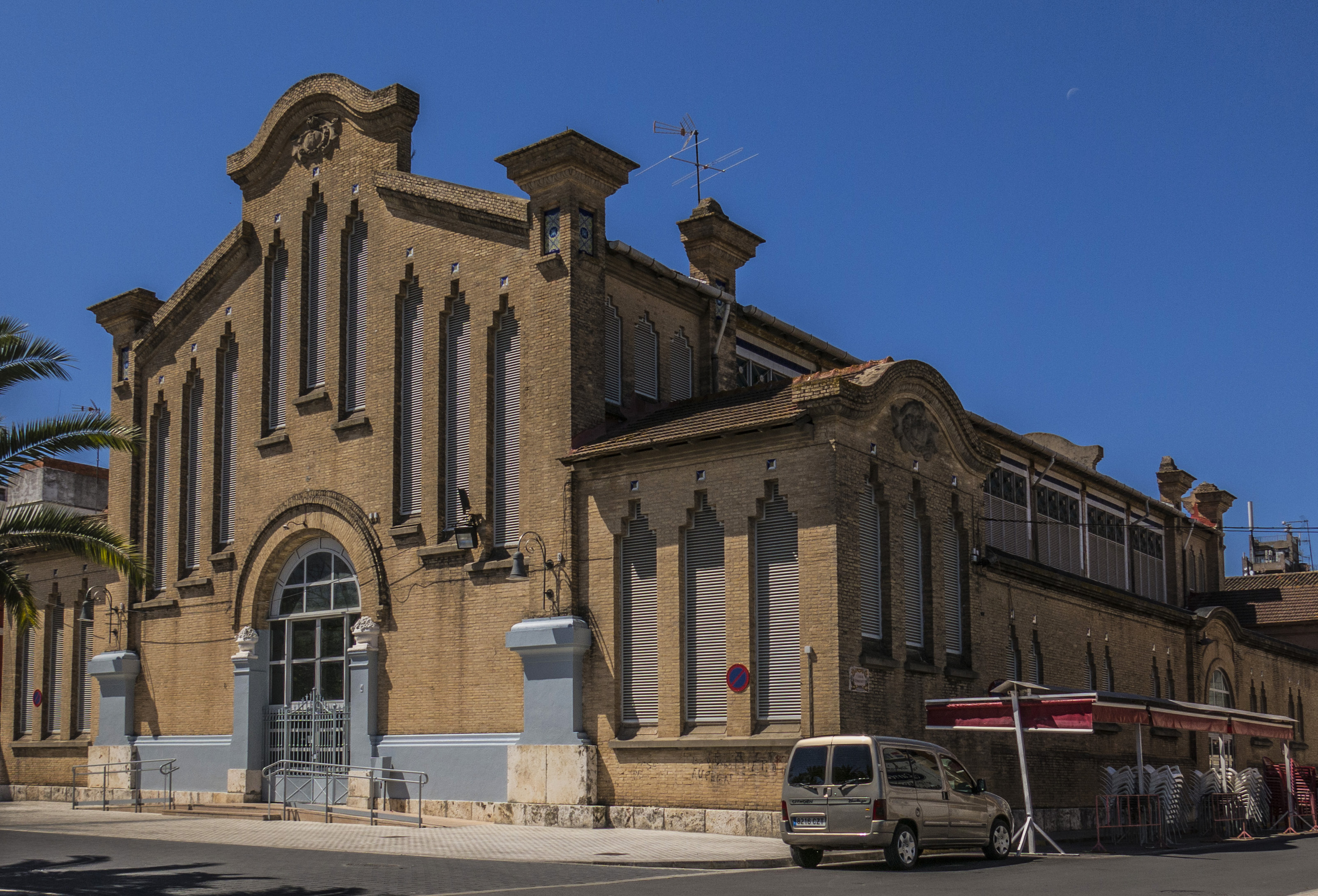 Castelló de la Ribera és un municipi de la Ribera Alta del País Valencià.